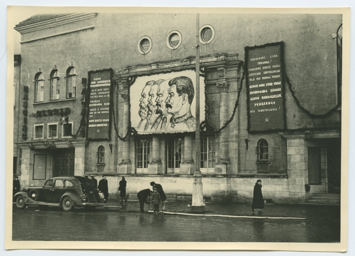 Tallinn, "Gloria Palace" fassaad Oktoobrirevolutsiooni piduehtes. This image on crowdsourcing geotagging platform Ajapaik